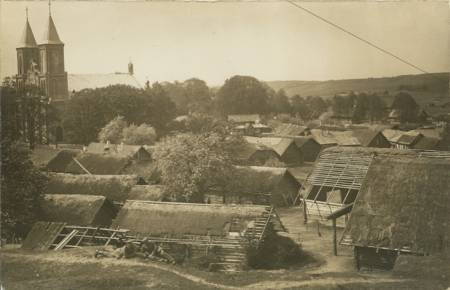 Беларуская (тарашкевіца): Трабы (Traby)